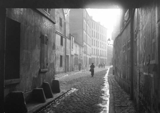 Passage des Fours-à-Chaux, Paris 19e, en 1913.